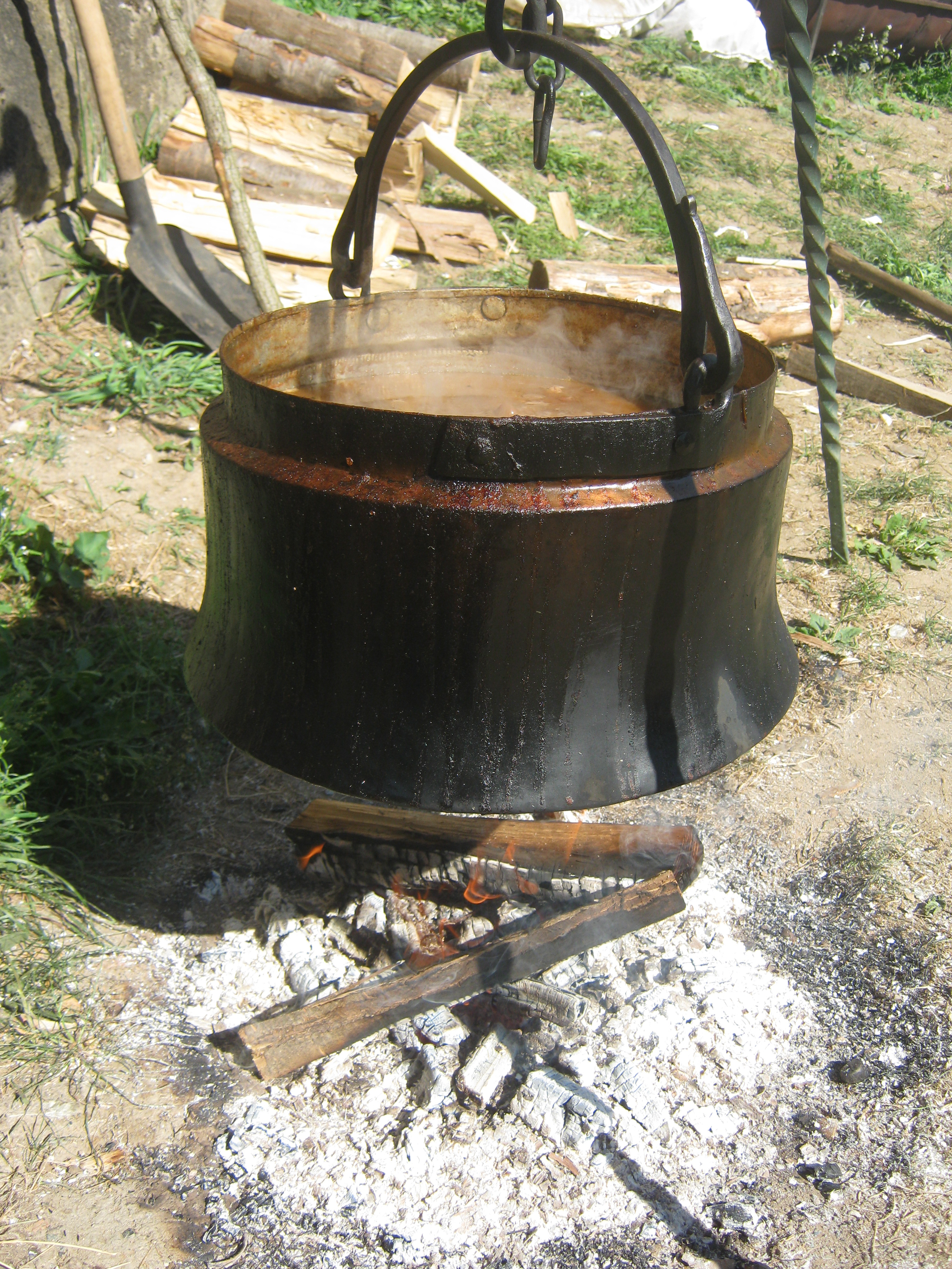 Српски (ћирилица): Током лета 2012. године.